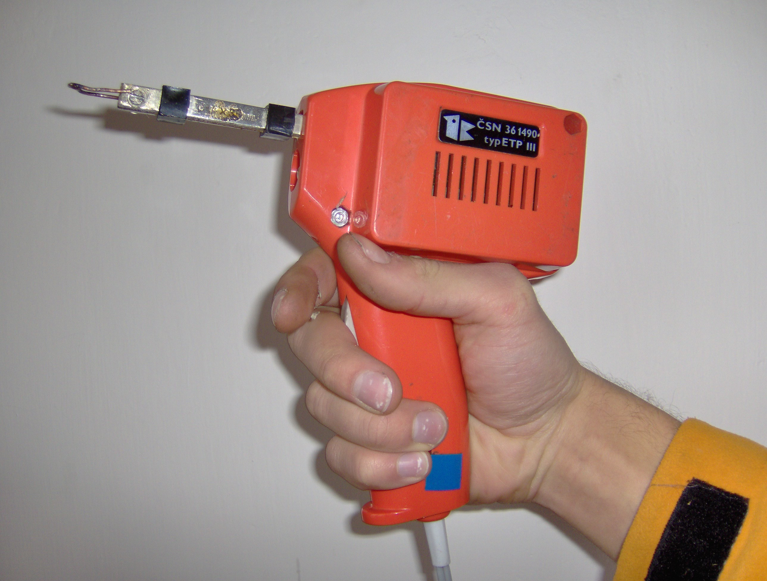 Standard soldering gun. 100 W